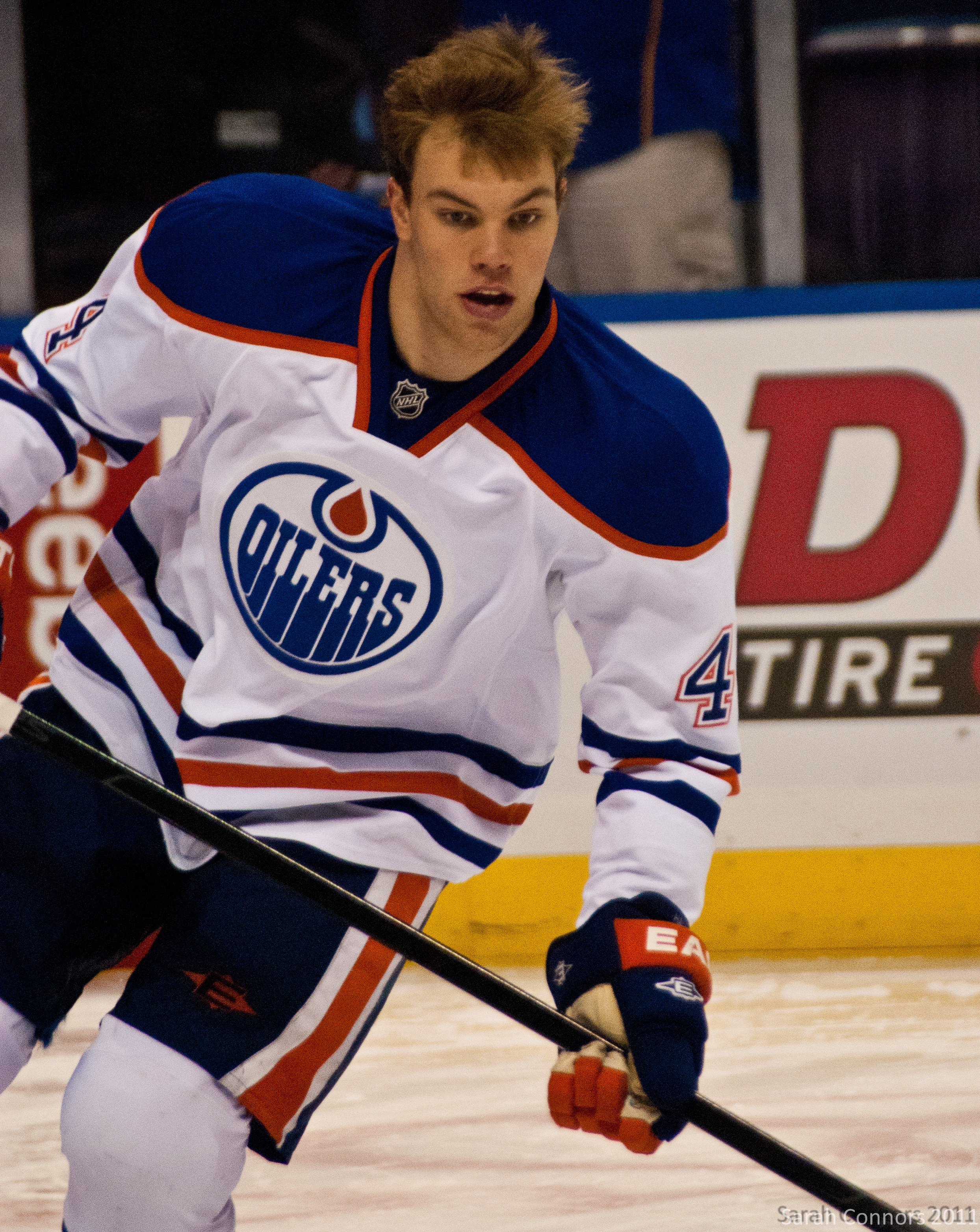 Blues vs. Oilers-9077.jpg